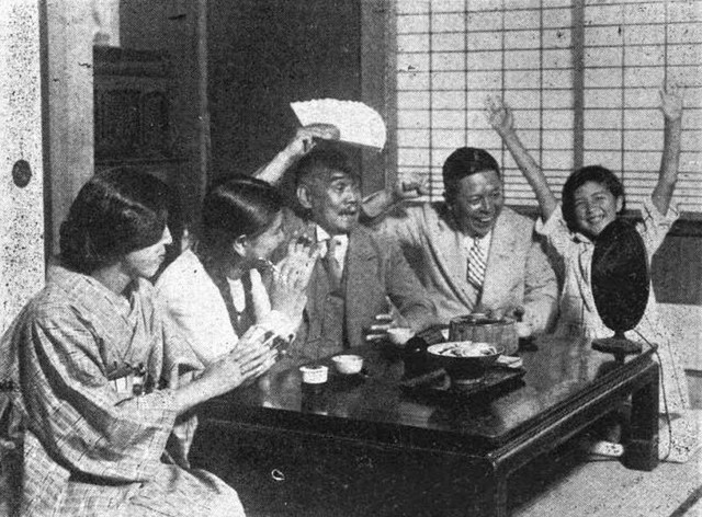 第十回オリムピック記念帖 喜ぶ南部家